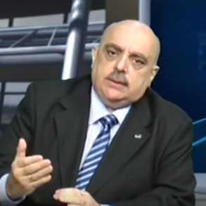 Biondini exponiendo su proyecto en Salto para las elecciones legislativas de 2017, para el canal 6, bajo el programa Salto en la Noticia.